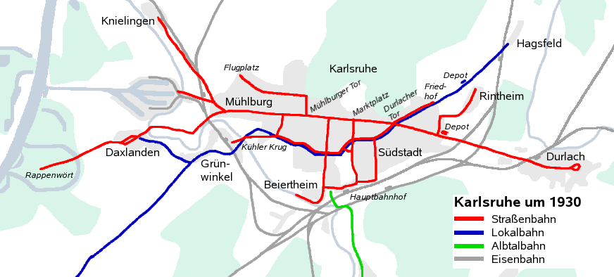 Streckenkarte der Karlsruher Straßenbahn um 1930